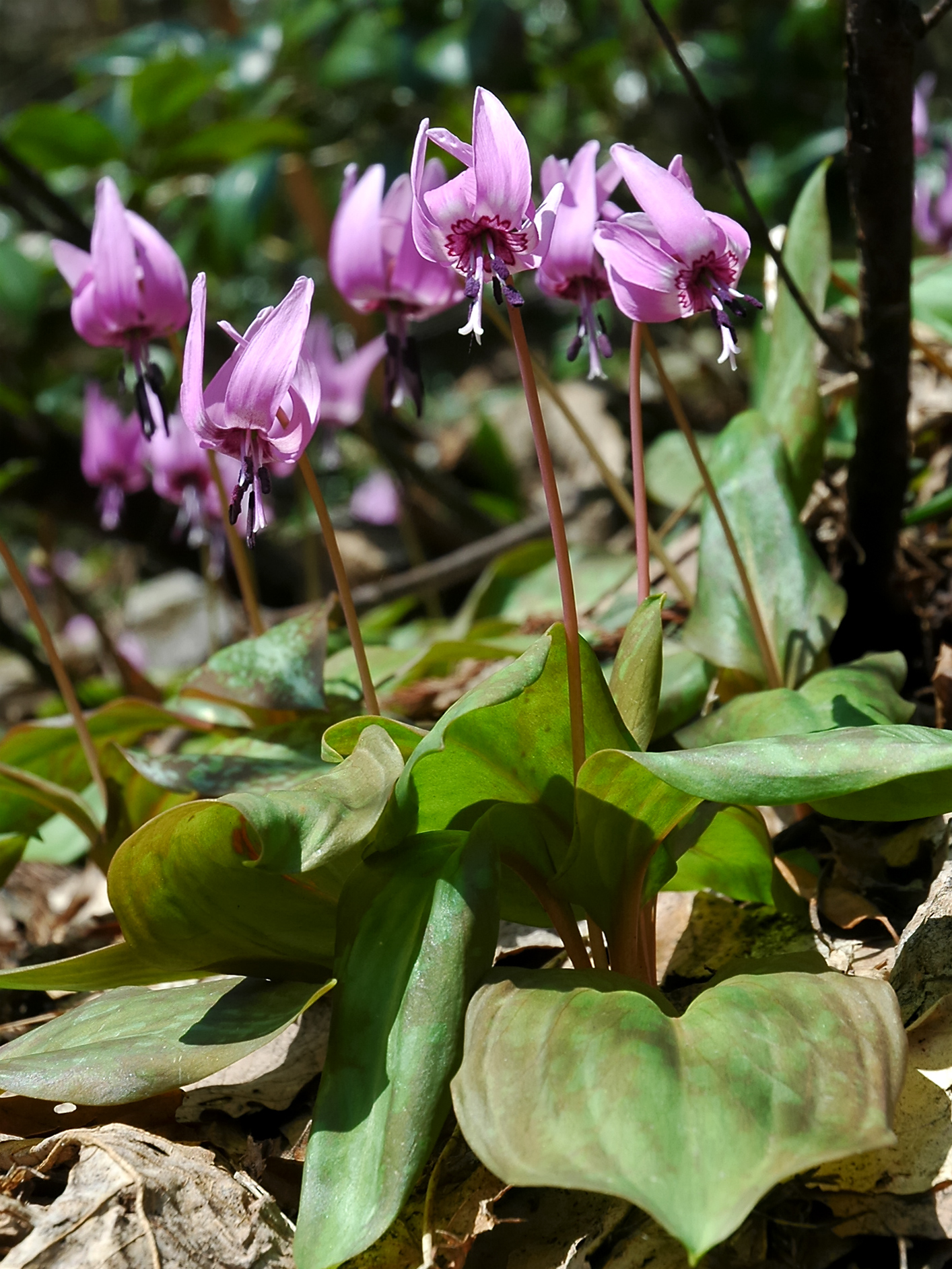 Erythronium japonicum (Katakuri, カタクリ)